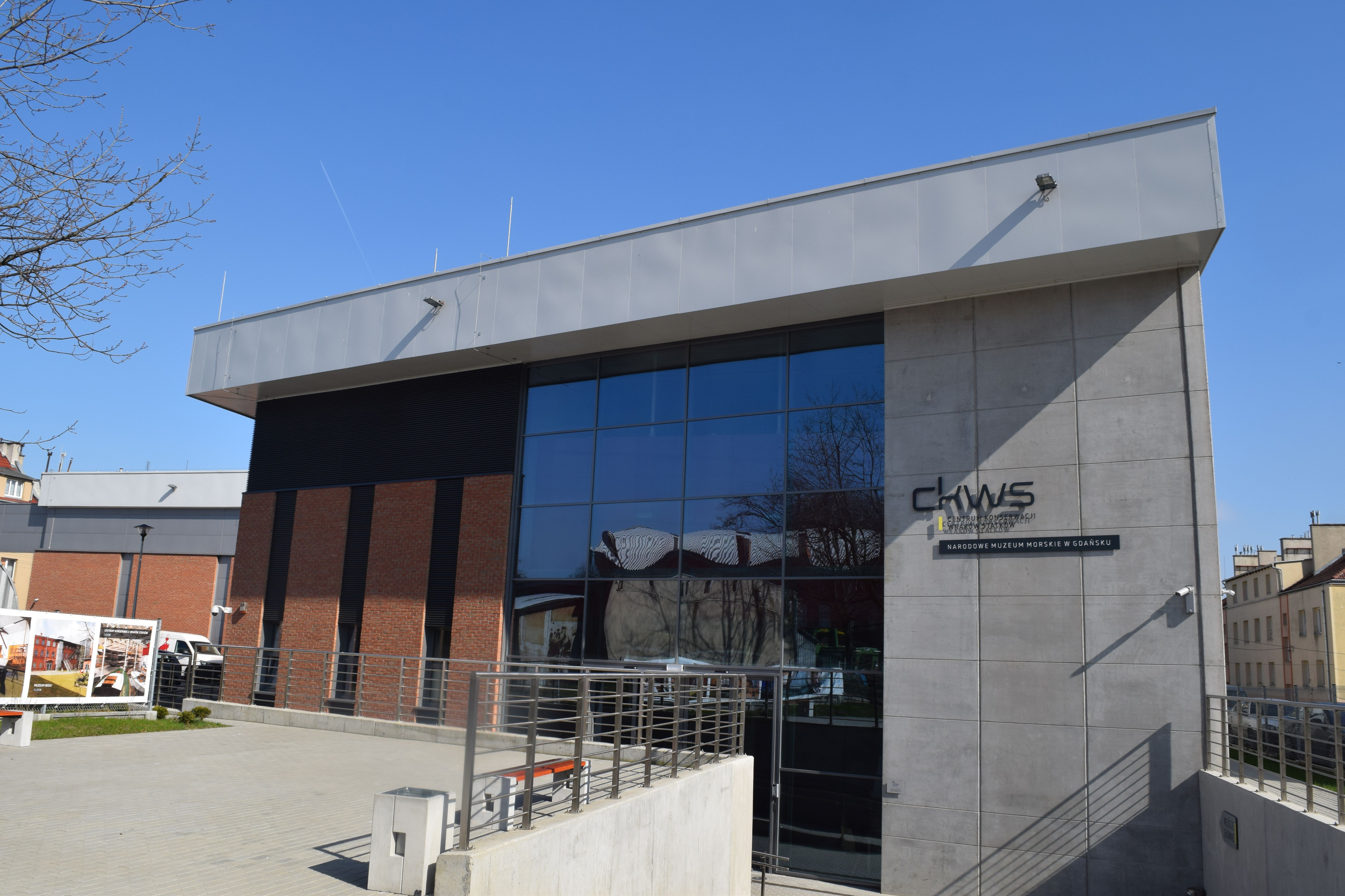 Centrum Konserwacji Wraków Statków w Tczewie - budynek